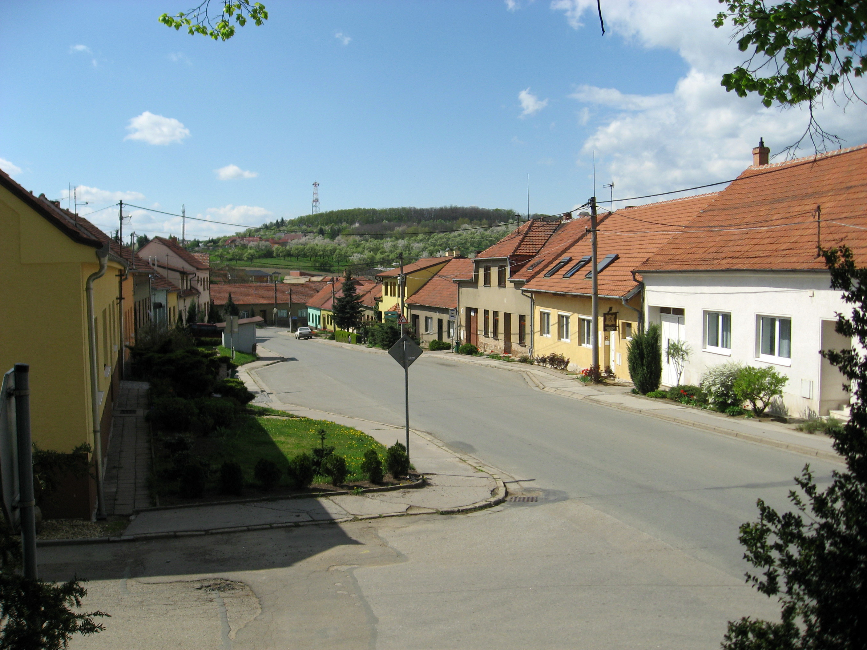 Nebovidy